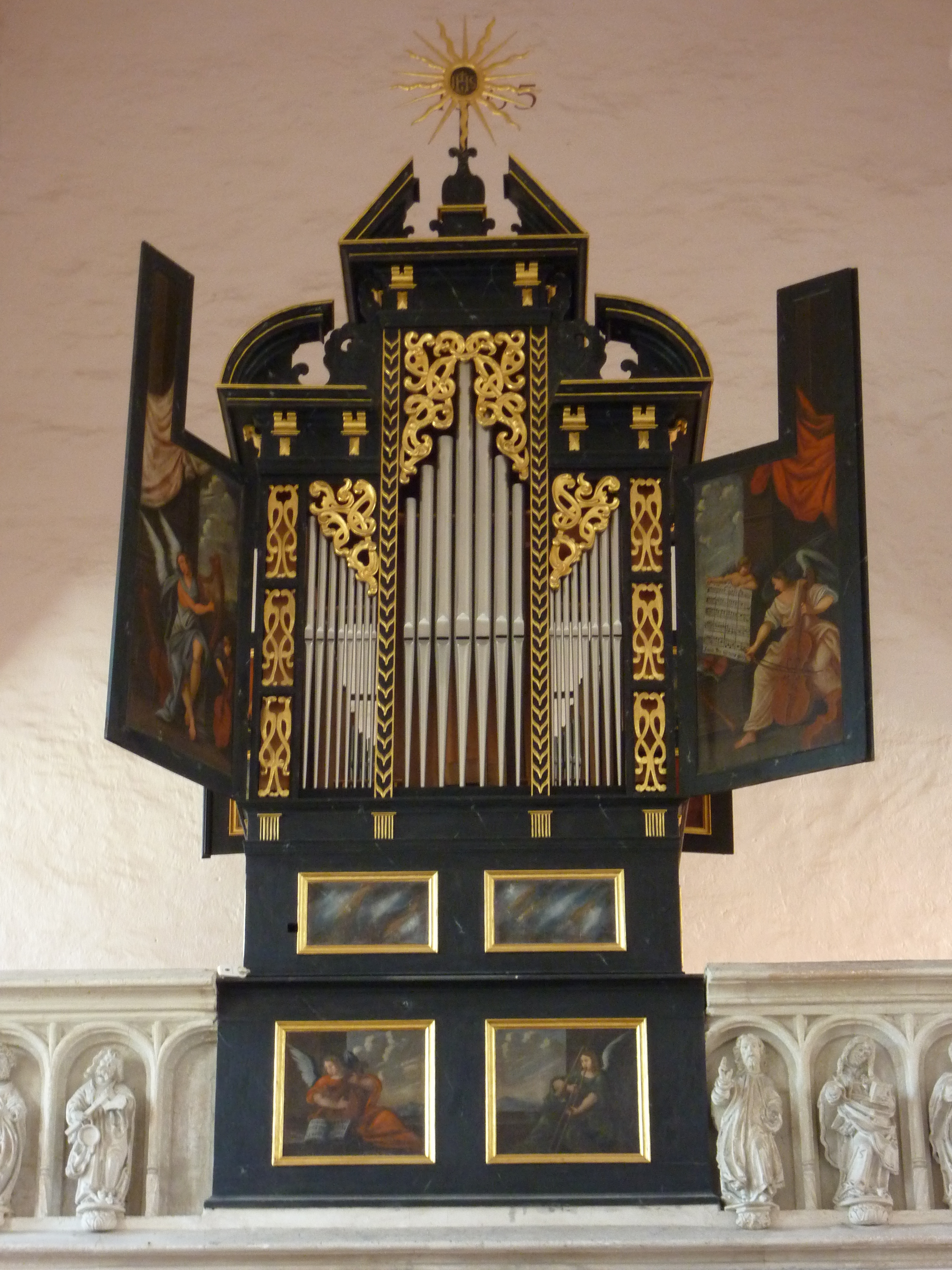 Filialkirche in St. Michael, Weißenkirchen in der Wachau, Niederösterreich - Orgel (frühes 17. Jh.) mit Bildern von musizierenden Engeln auf den Flügeln und auf der Brüstung